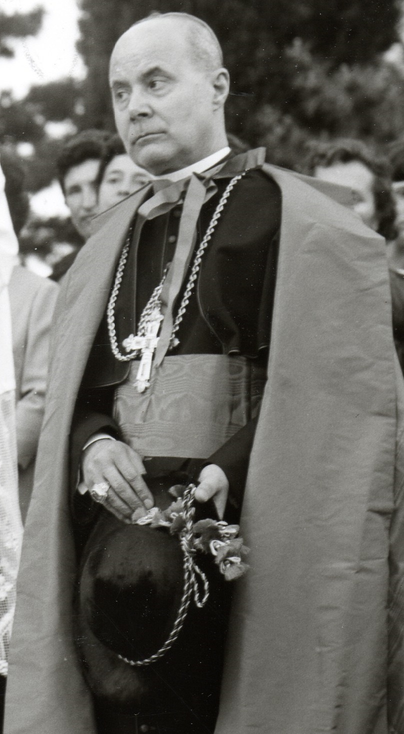 Cardinale Giuseppe Paupini durante una funzione a San Michele al Fiume.